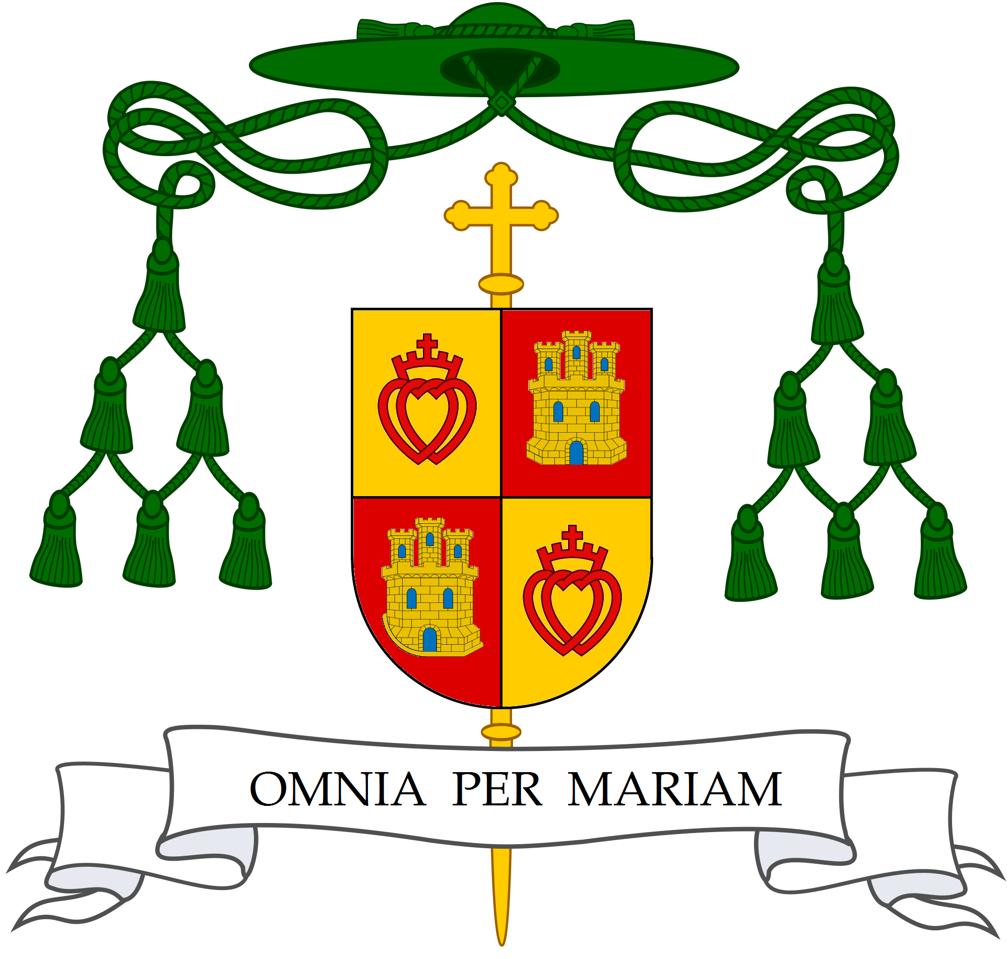 Brasão Episcopal de Dom Galaretta, bispo da Fraternidade Sacerdotal São Pio X; produzido conforme modelo original